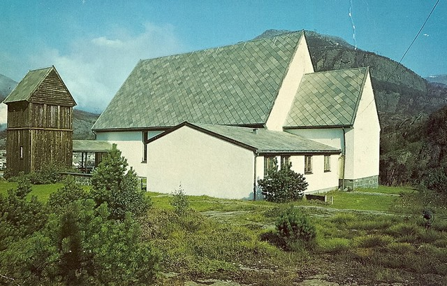 Svelgen kapell